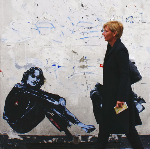 Lidia Boševski: Portret